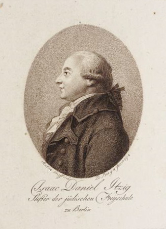 Isaac Daniel Itzig (1750-1806)